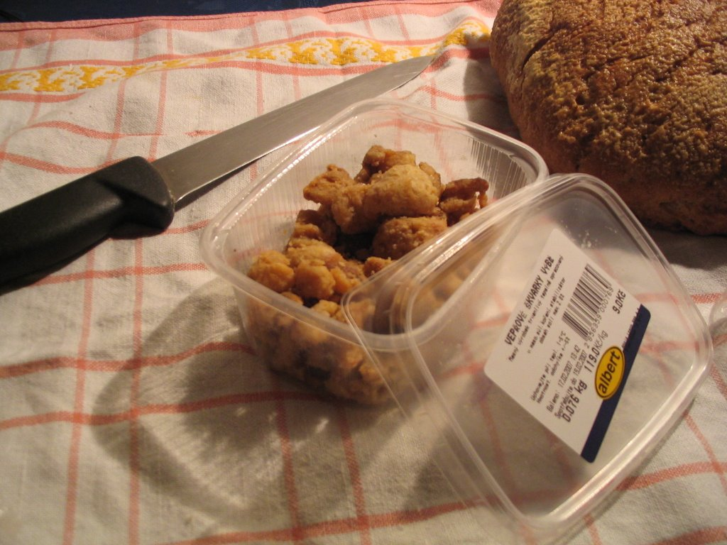 Čvarci